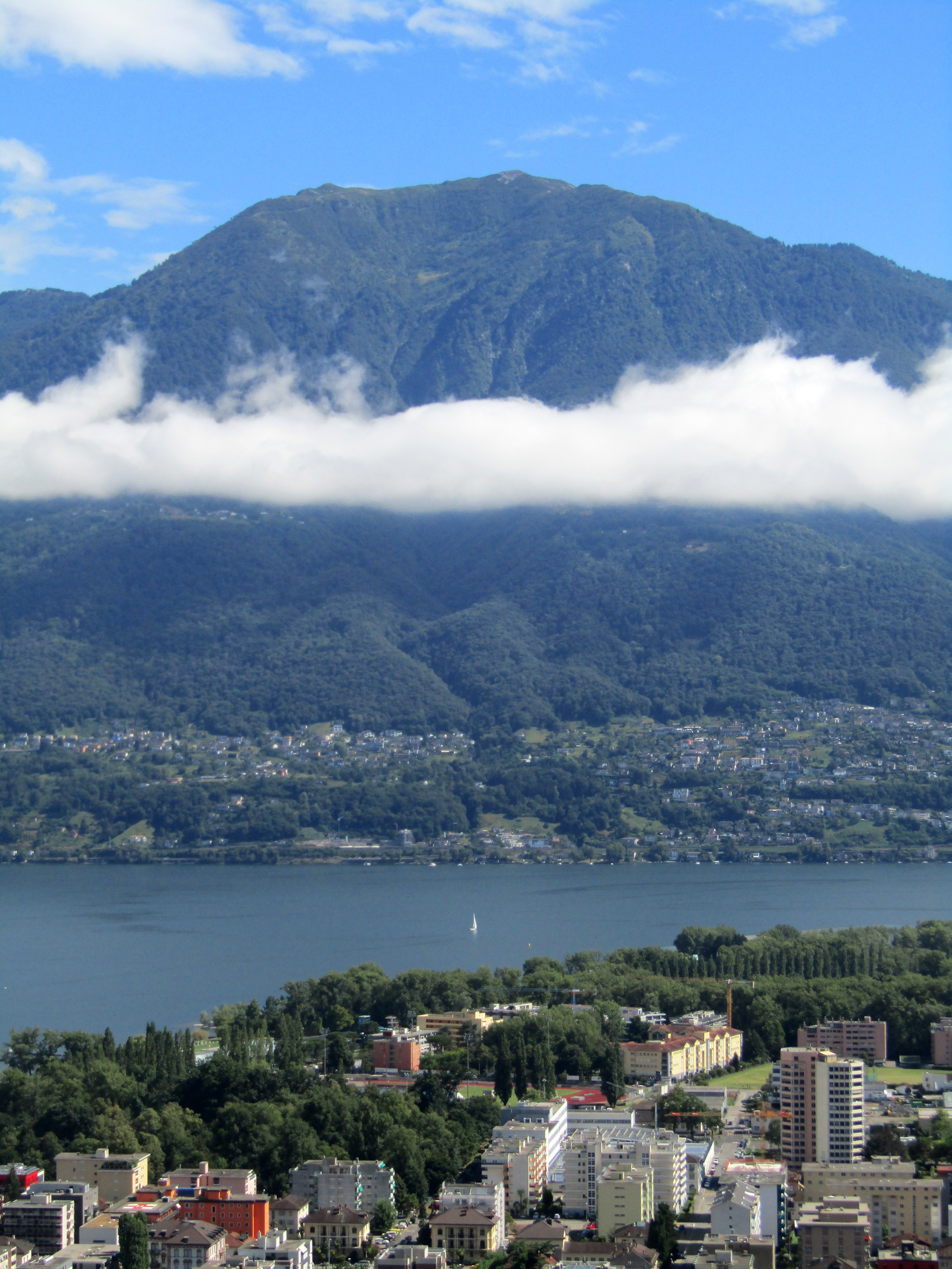 Il monte Gambarogno visto dalla Madonna del Sasso (Orsellina, CH)